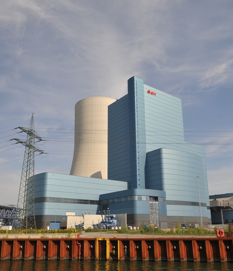 EON-Kraftwerk Datteln IV, Stand Mai 2013; davor Dortmund-Ems-Kanal und Bahnstromfreileitung